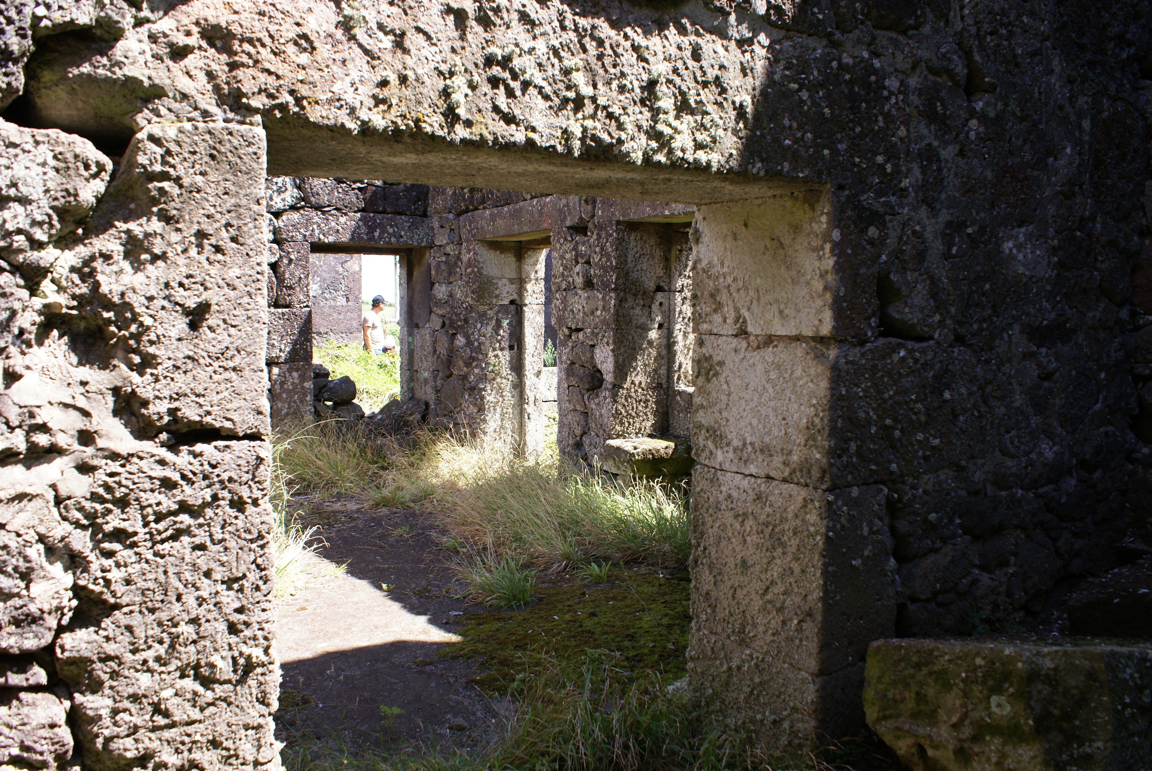 Solar dos Tiagos, ruínas do interior, divisões, Topo, Calheta, ilha de São Jorge, Açores